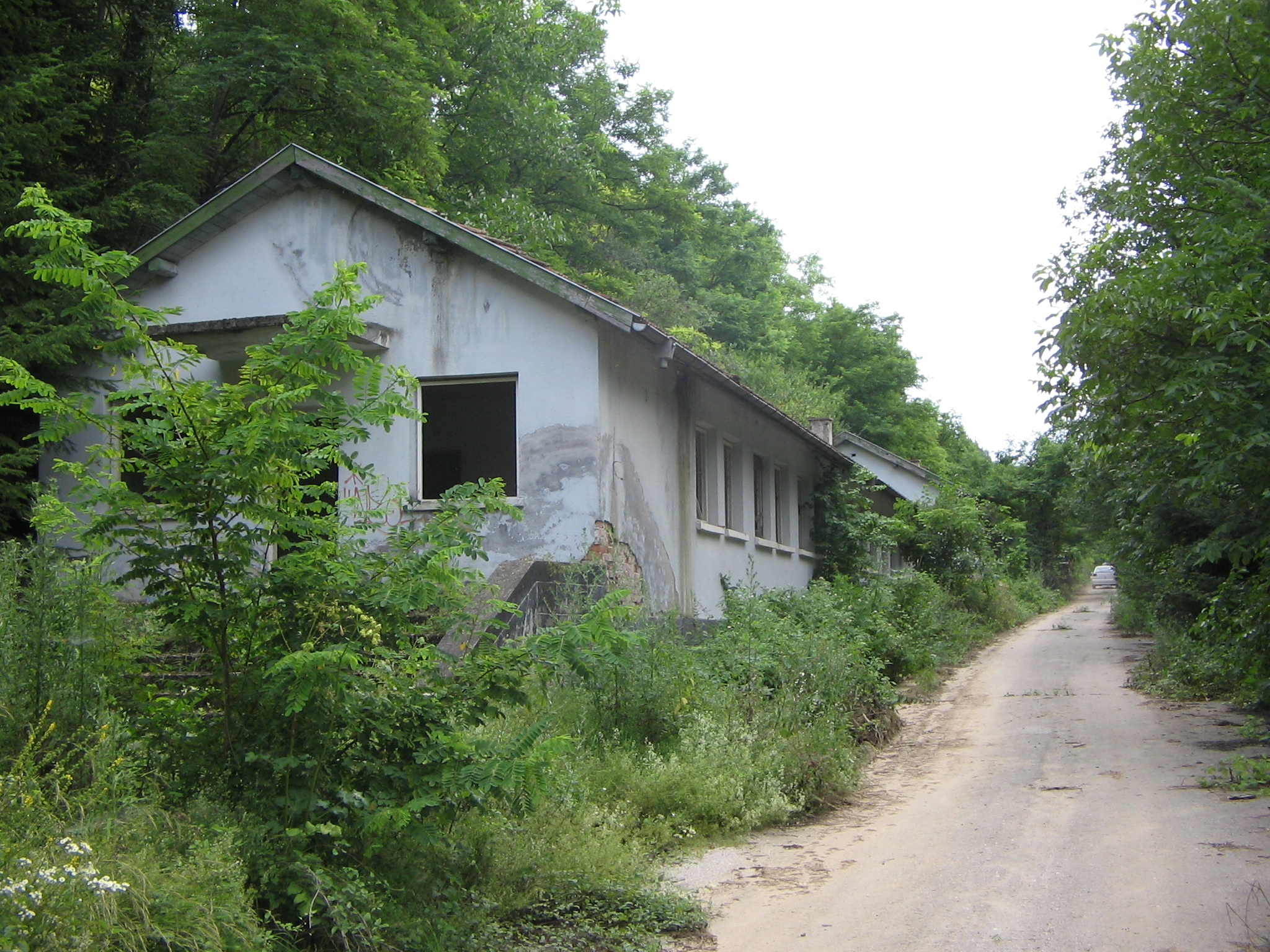 изоставени сгради -бивши спални помещения в учебния военен лагер